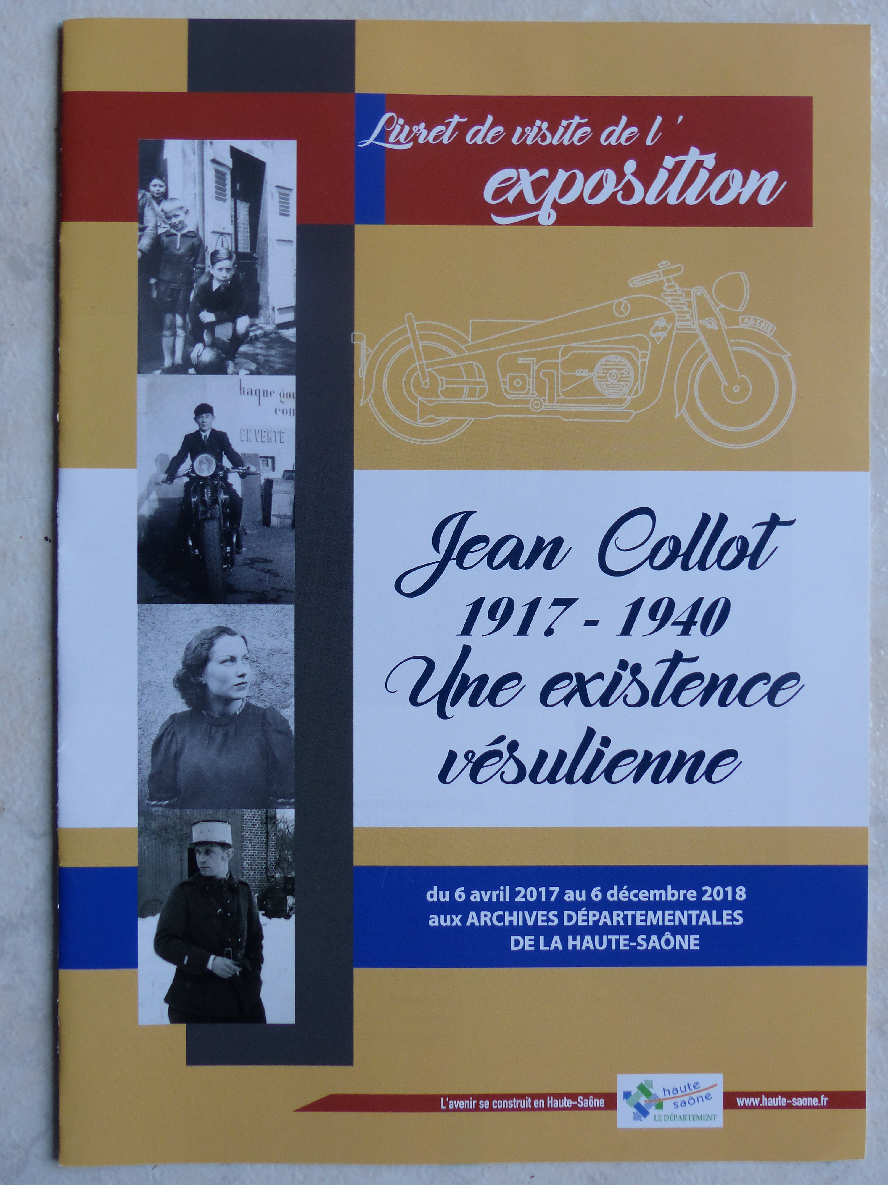 Livret de l'exposition "Jean Collot 1917-1940 une existence vésulienne " aux Archives Départementales de la Haute-Saône (6 décembre 2017 - 6 avril 2018). Conception graphique Gérard Puthomme